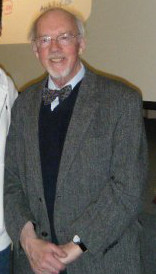 Il biochimico Sir Hans Kornberg